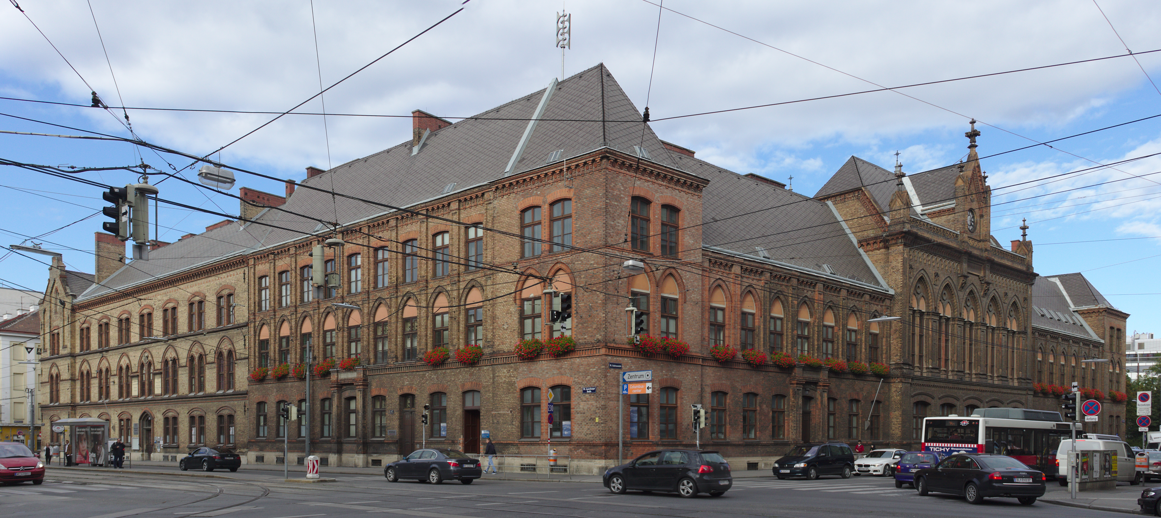 Bezirksamt